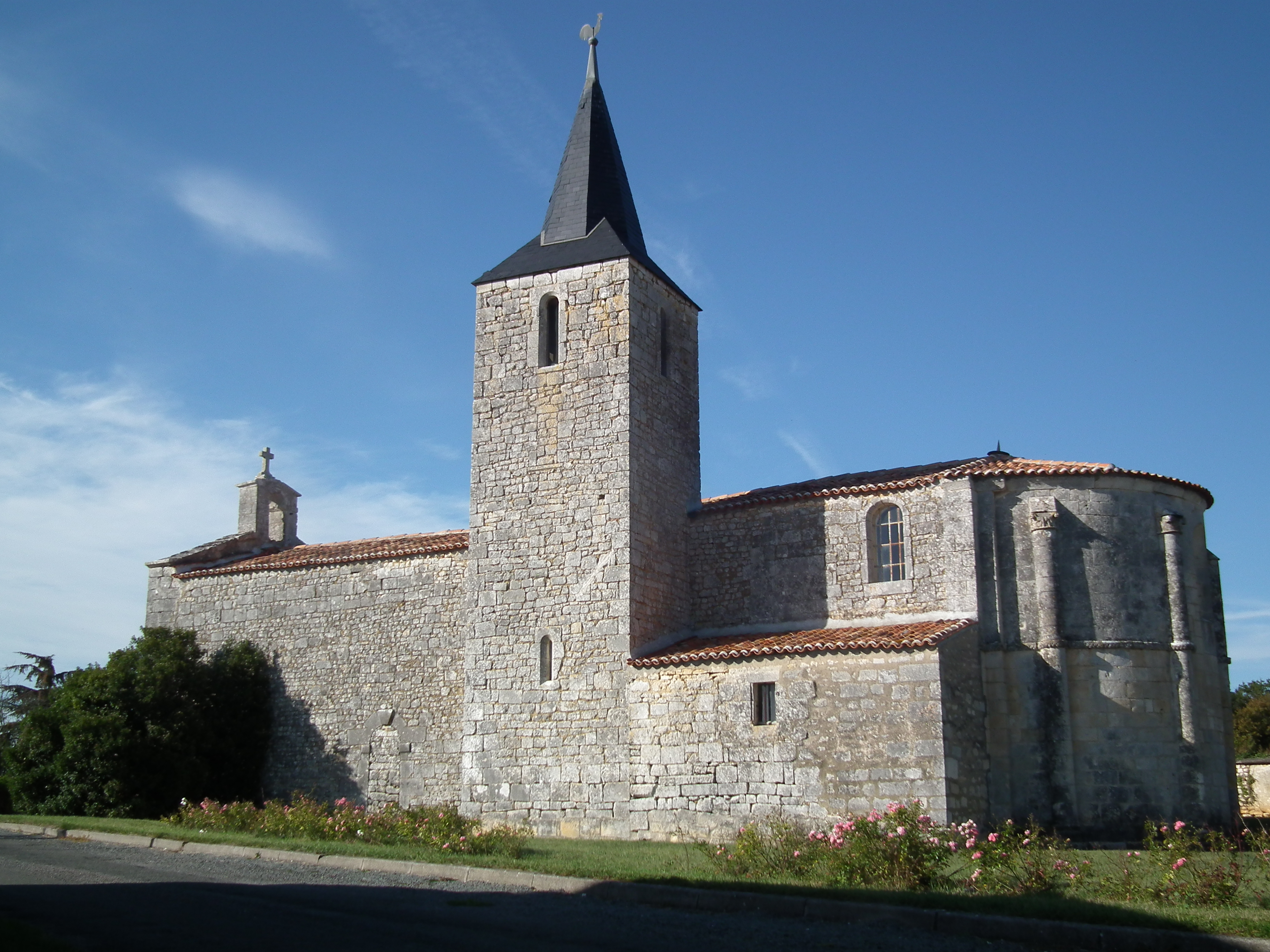 L'église de Saint-Vaize